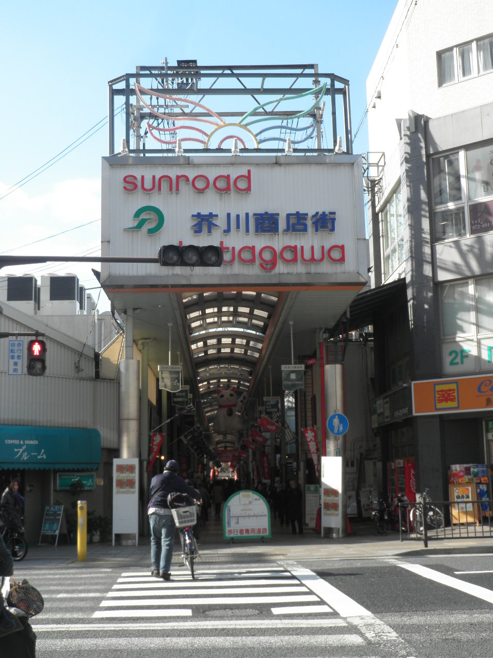 芥川商店街